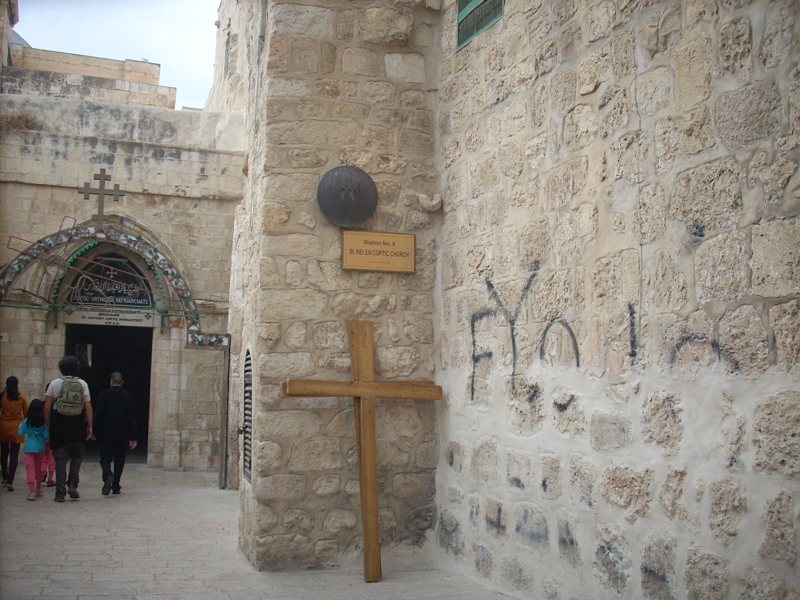 דרך הייסורים היא דרך בעיר העתיקה בירושלים בה על פי האמונה הנוצרית צעד ישו מהמקום בו נגזר דינו לצליבה ועד גבעת הגולגולתא בה בוצע גזר הדין.התחנה התשיעית מציינת את המקום בו נפל ישו בפעם השלישית. כיום מיקומה של התחנה מסומן על ידי עמוד הקבוע בקיר מנזר דיר אנטוניוס הקופטי הצמוד לכנסיית הקבר.